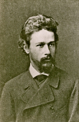 Nikolaj Aleksandrovič Jarošenko